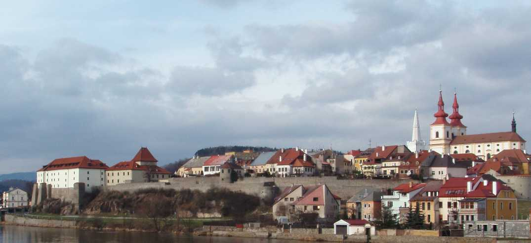 Kadaň, (Kaaden), Czech Republic